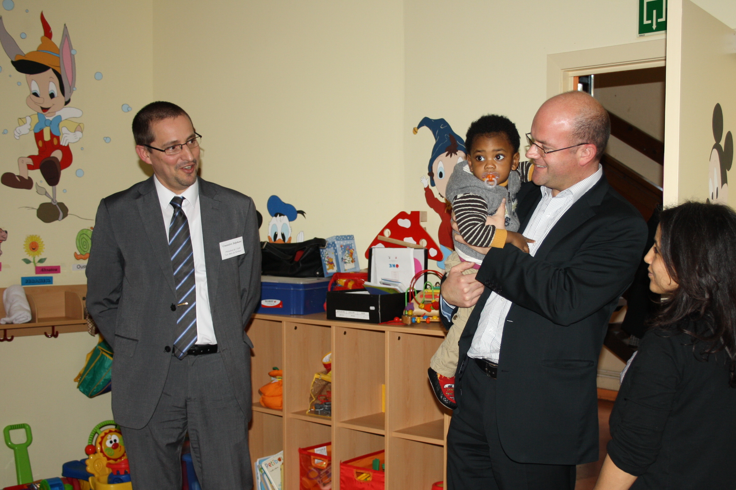 Visite du Secrétaire d'Etat Philippe Courard au Centre d'accueil pour candidats réfugiés de Rixensart (Brabant wallon - Belgique).